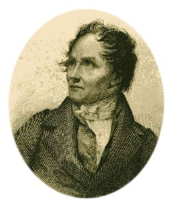 Portrait de C. Delavigne. Origine: Oeuvres complètes de C. Delavigne 1836 Domaine public expiré